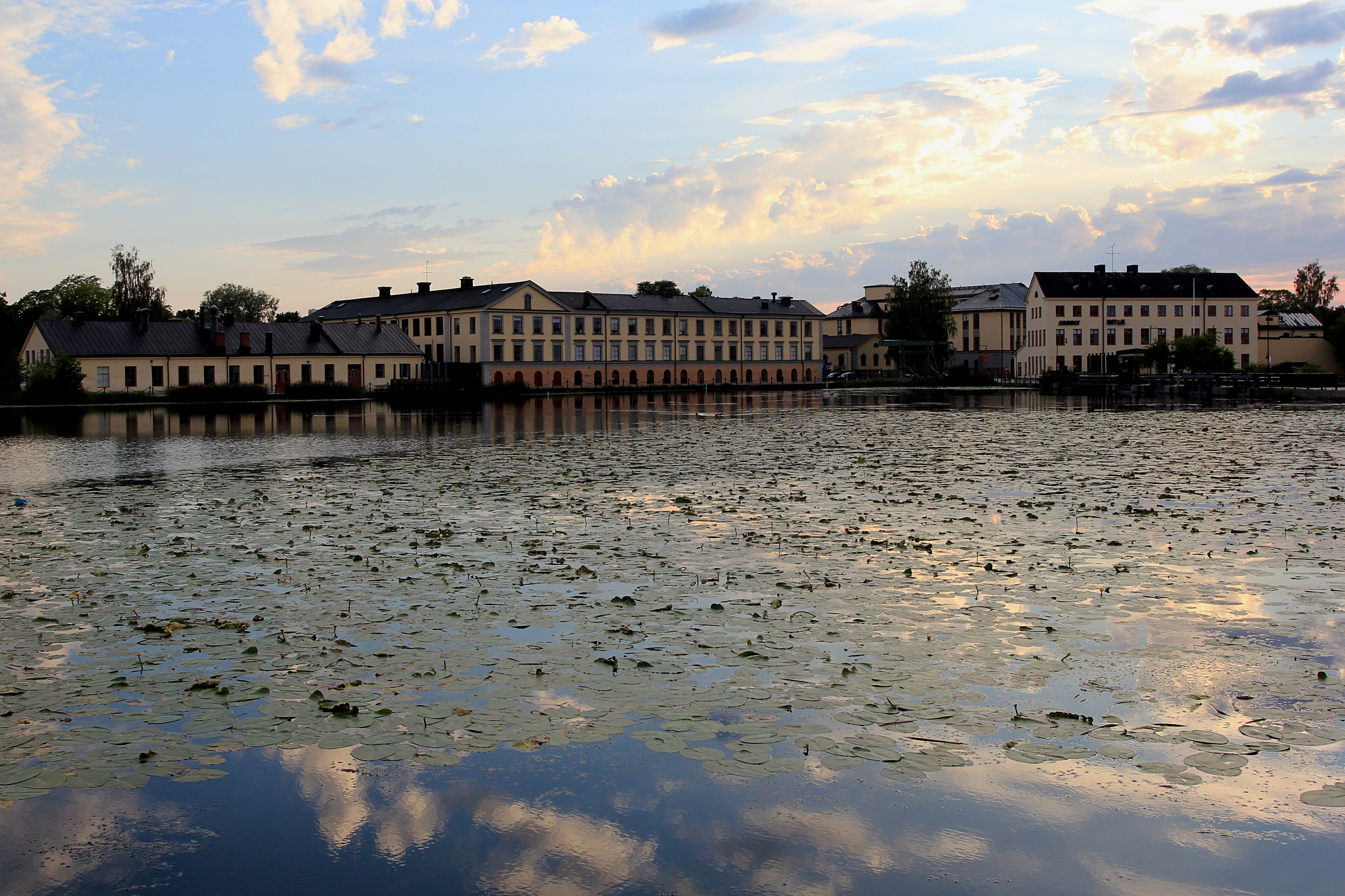 Faktoriholmarna, Eskilstuna, Sverige, i solnedgång. Faktoriet t.v.